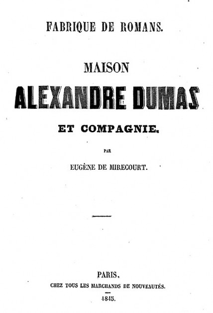 Титульный лист памфлета Эжен де Мерикур «Фабрика романов. Торговый дом Александр Дюма и Ко»